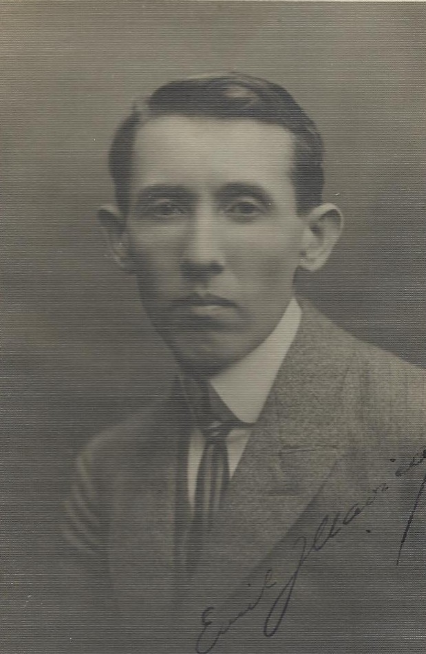 Emil Hlavica, český sochař